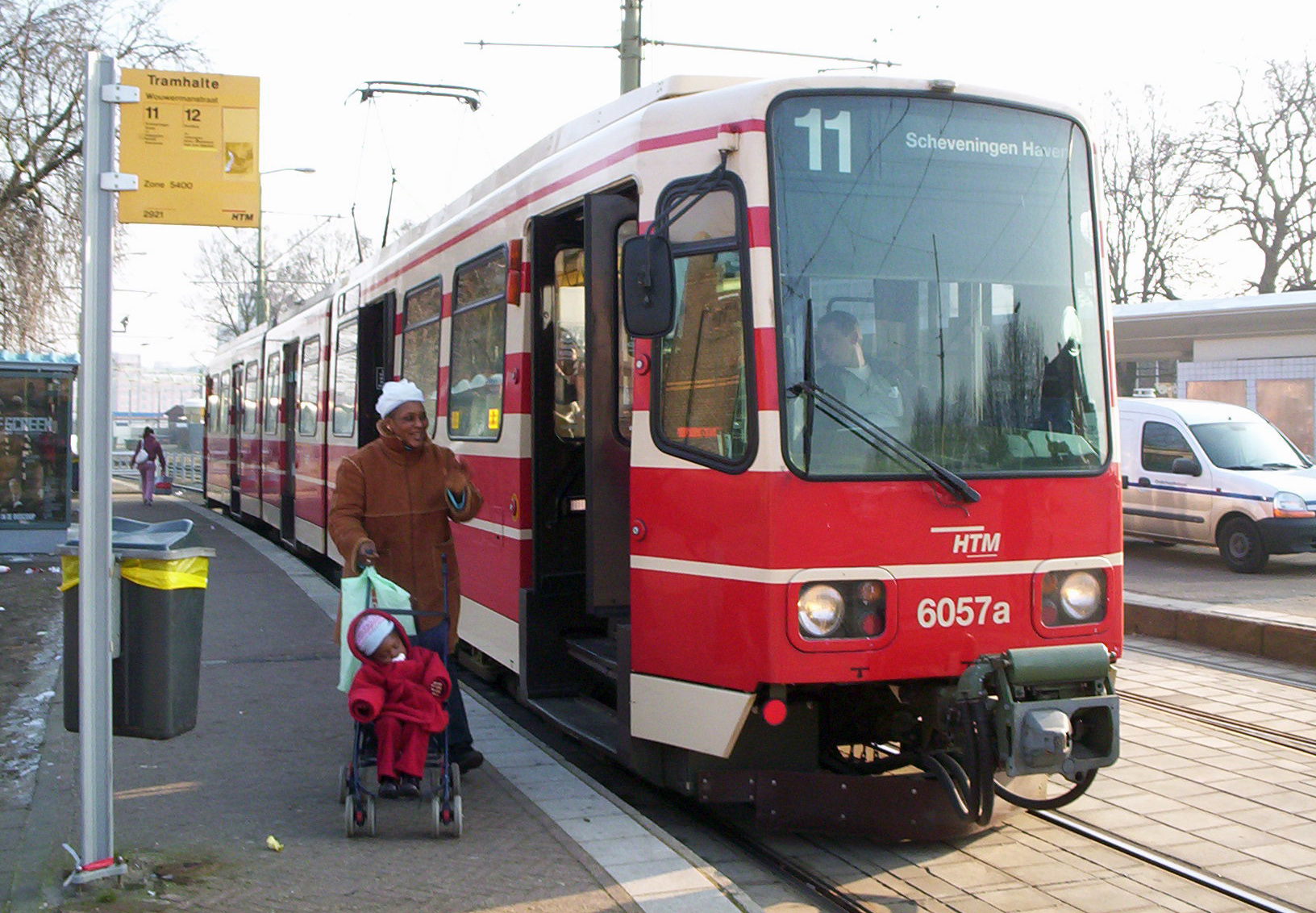 Een TW6000-tram in Den Haag. De serie was inmiddels buiten dienst gesteld.